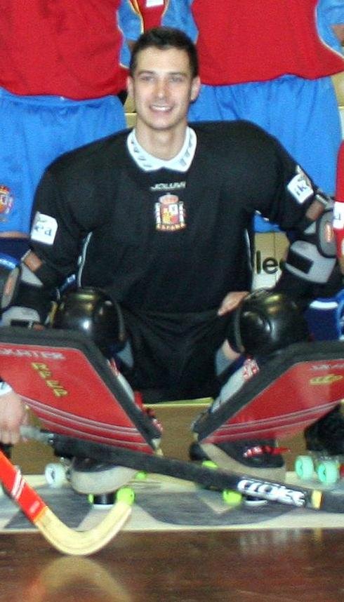 Sergi Fernàndez coa selección española de hockey no campionato do mundo de 2007 en Montreux.